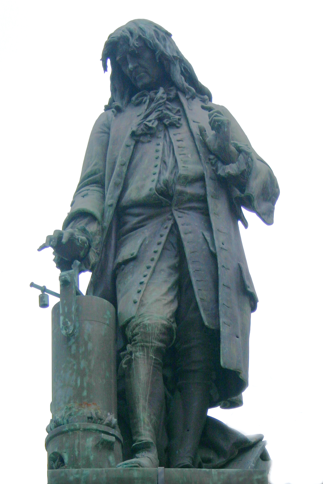 Denis Papin sculpté par Aimé Millet. Statut à Blois.